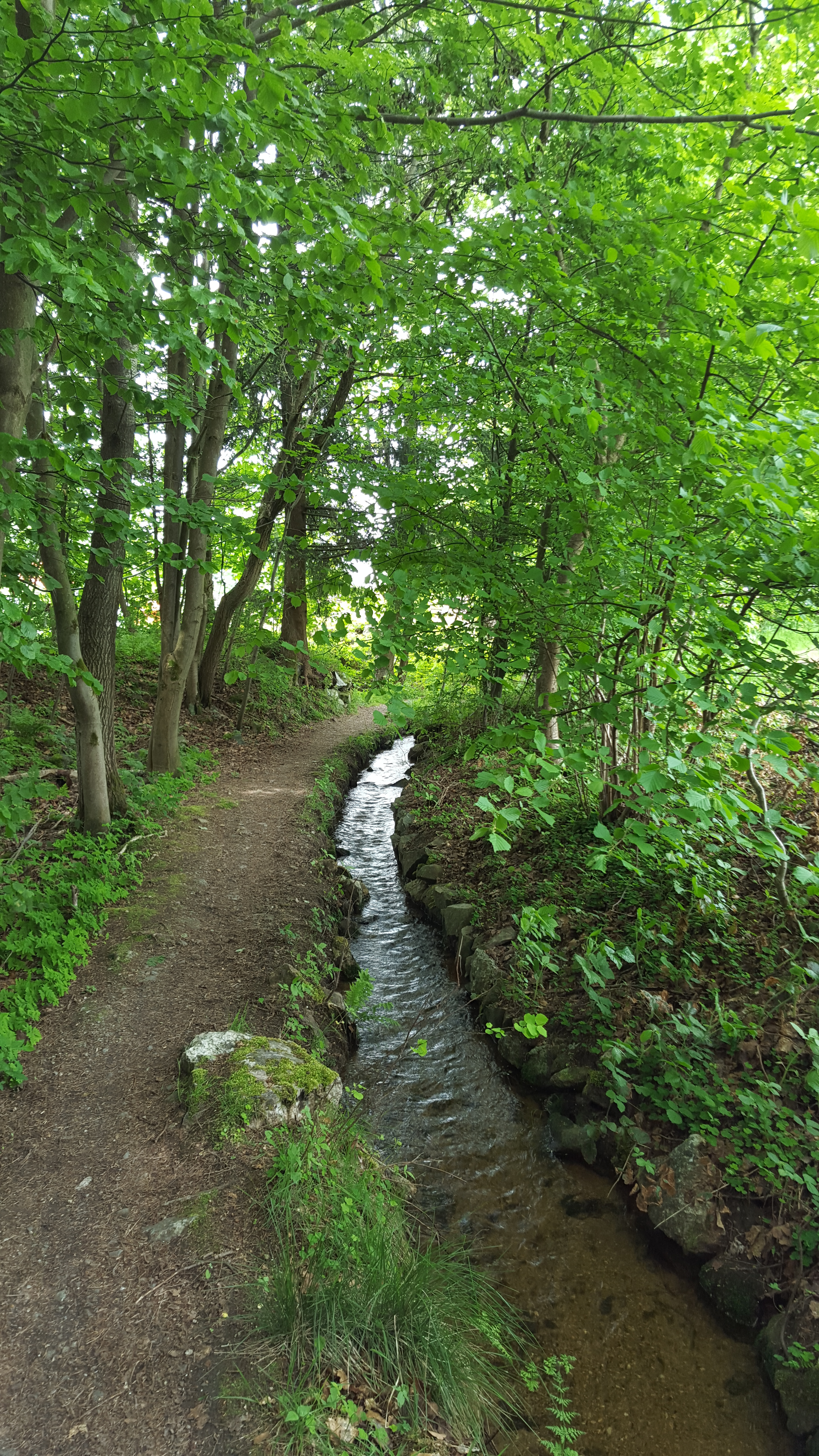 Bach bei Fichtelberg